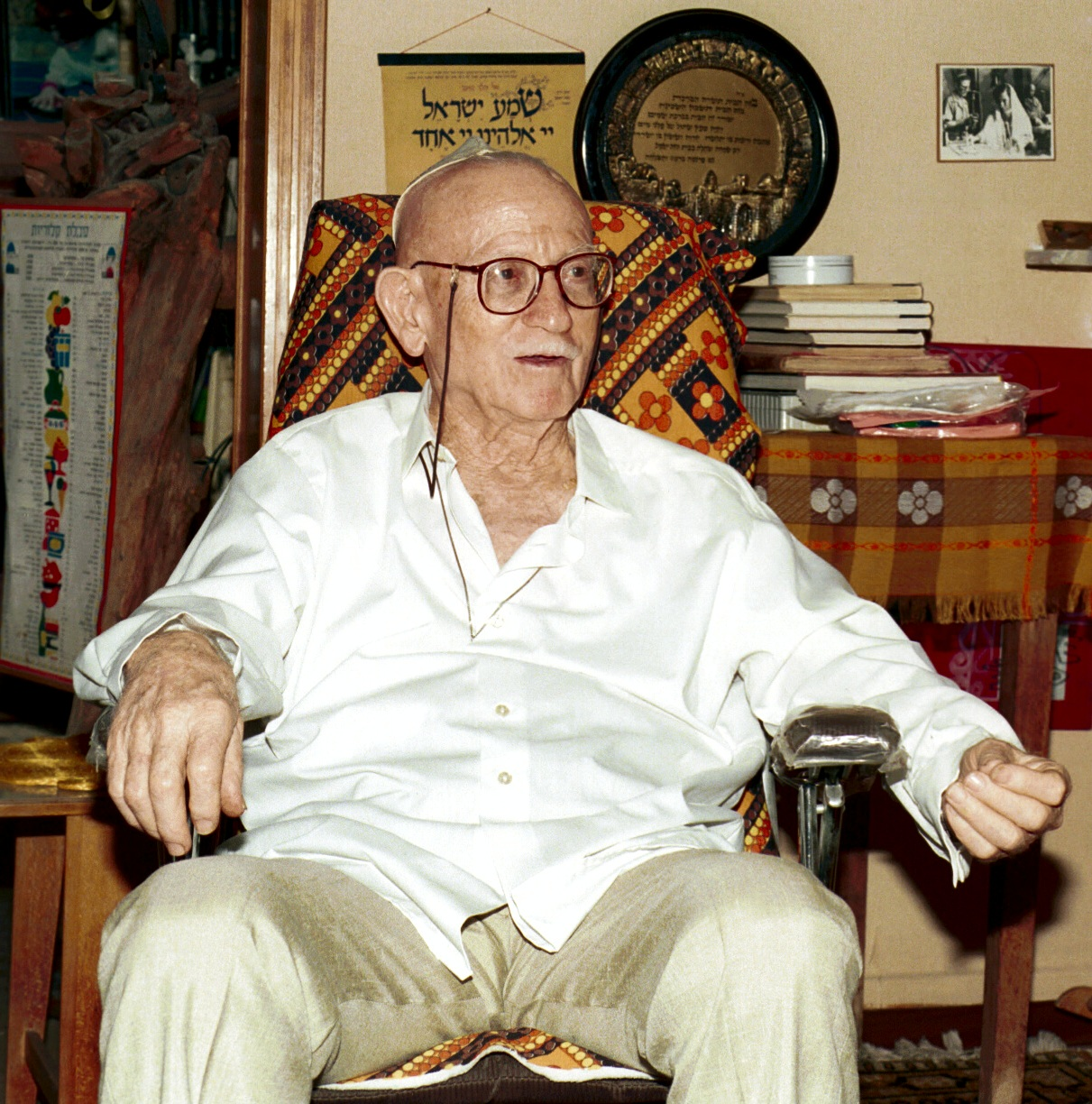 אברהם עץ הדר בביתו צילום משנת 1994